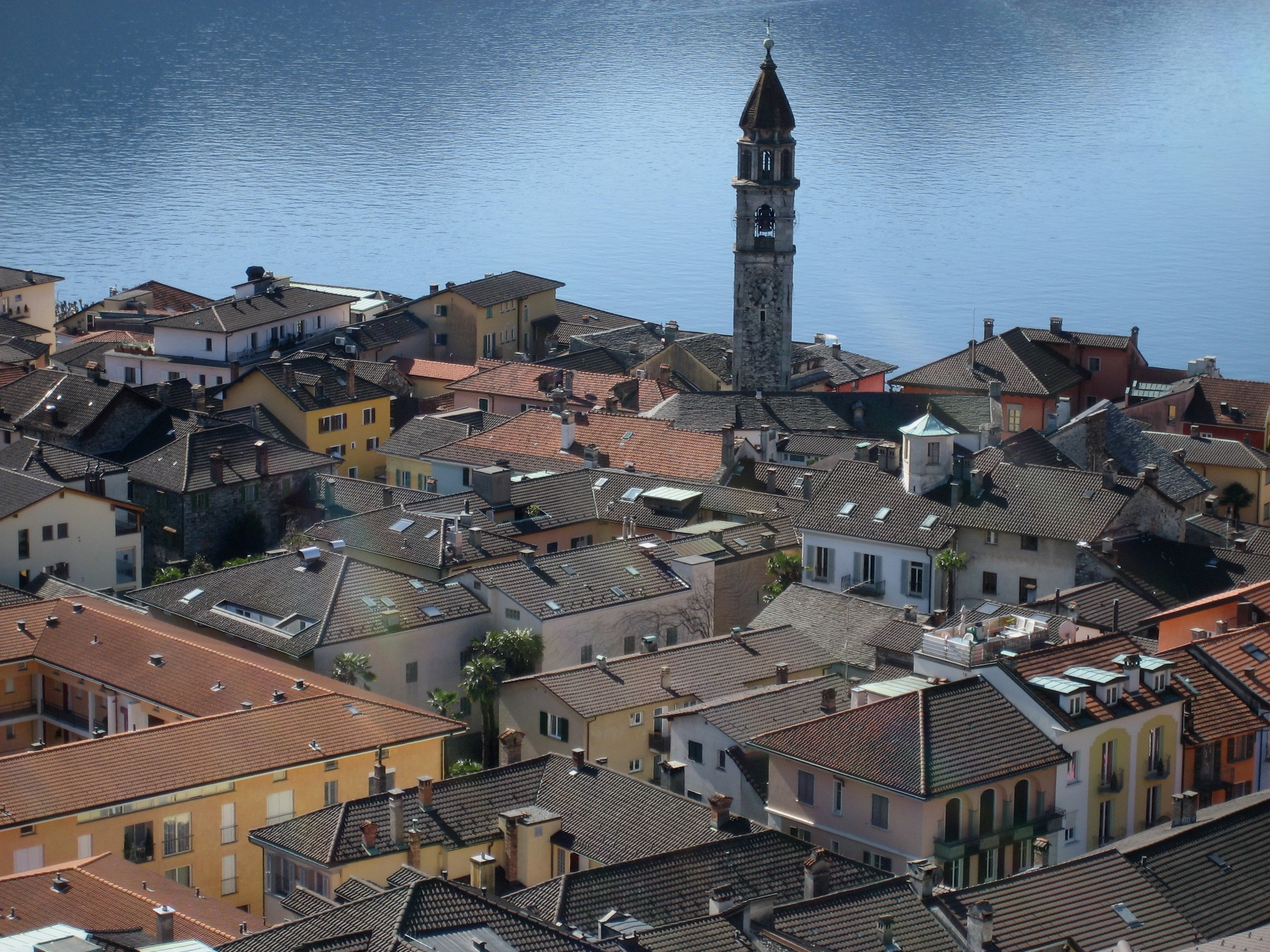 Dächer des Kerns Ascona